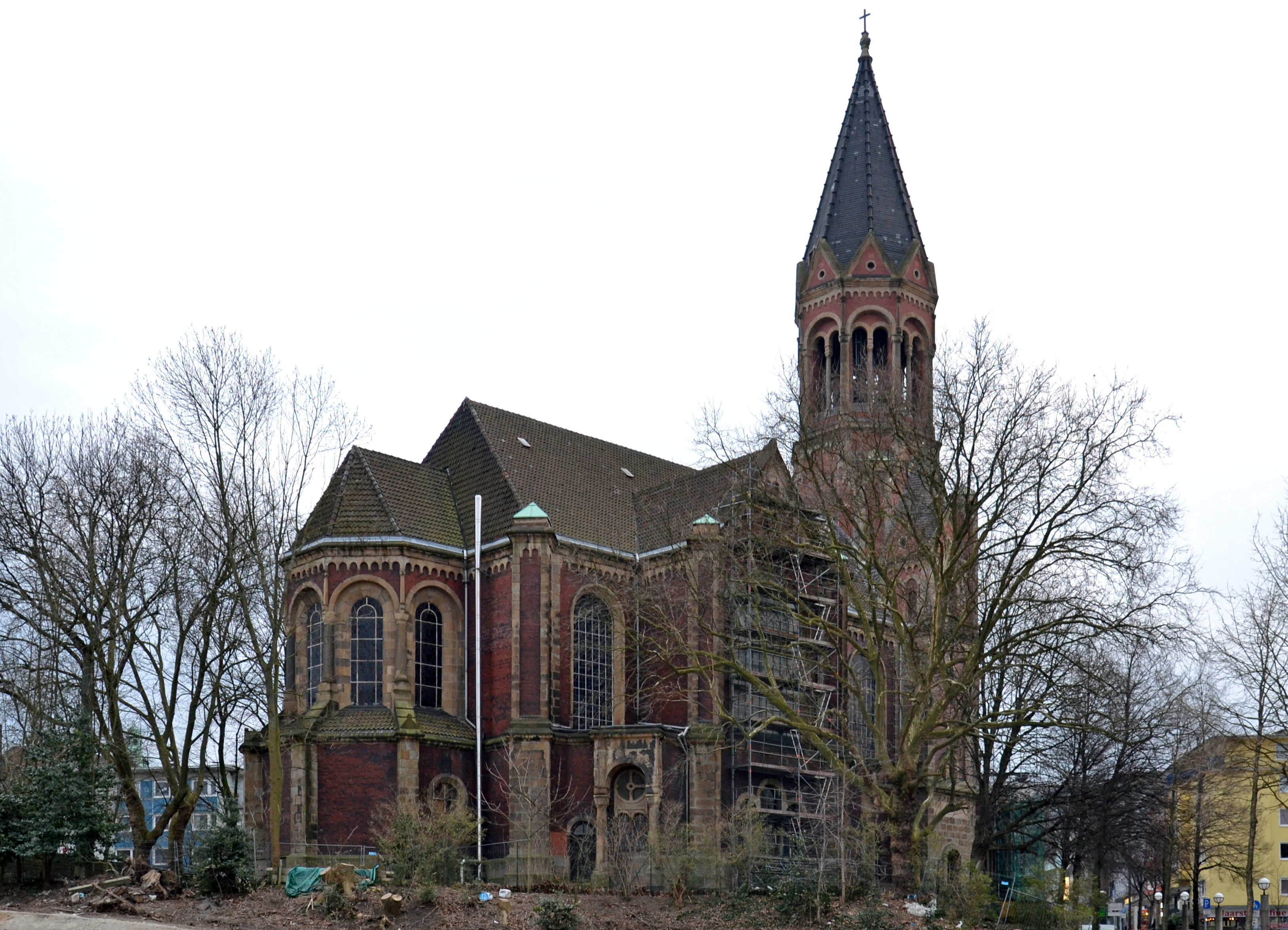 Evangelische Kreuzeskirche im Essener Stadtkern